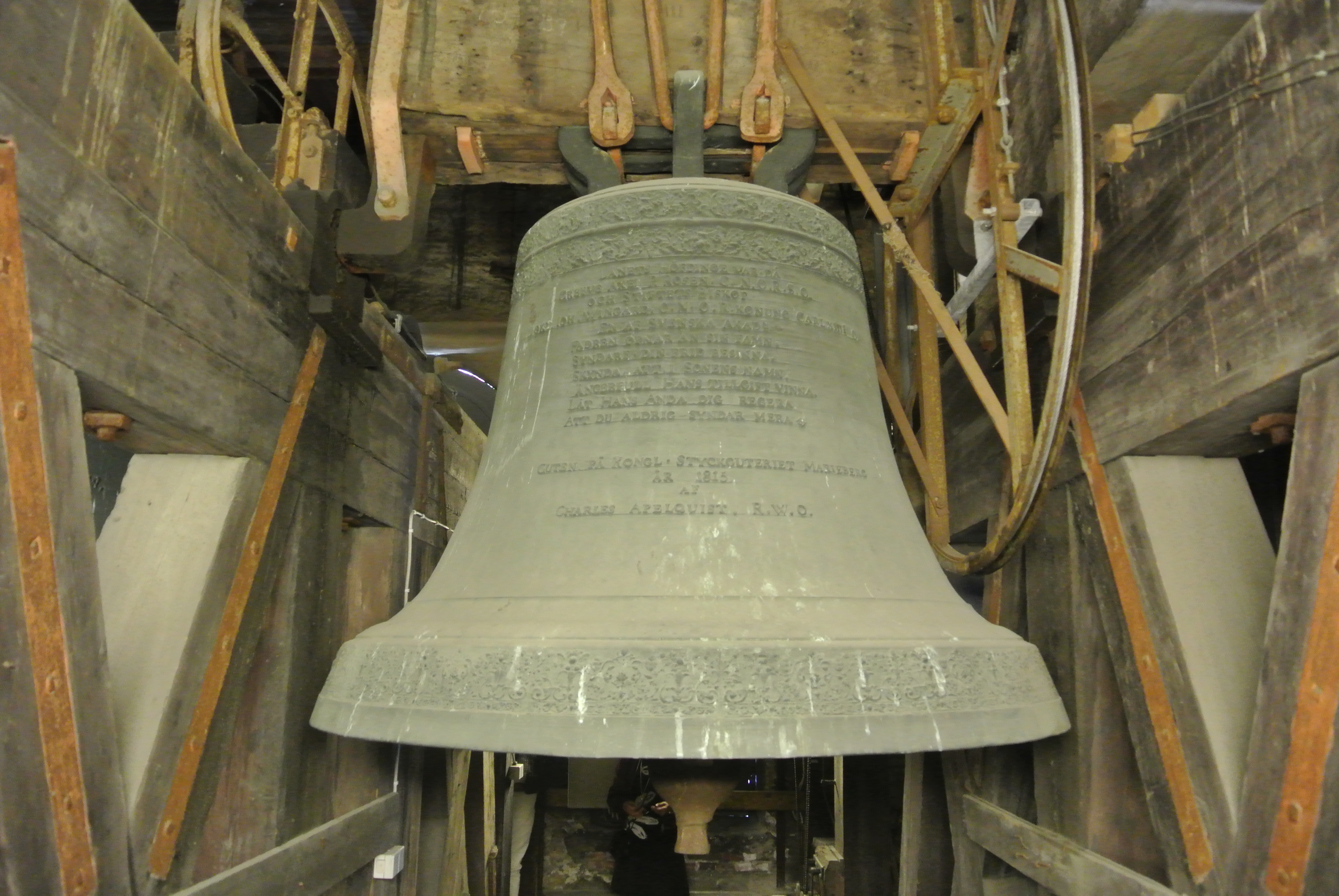 Vardagsklockan i Göteborgs domkyrka